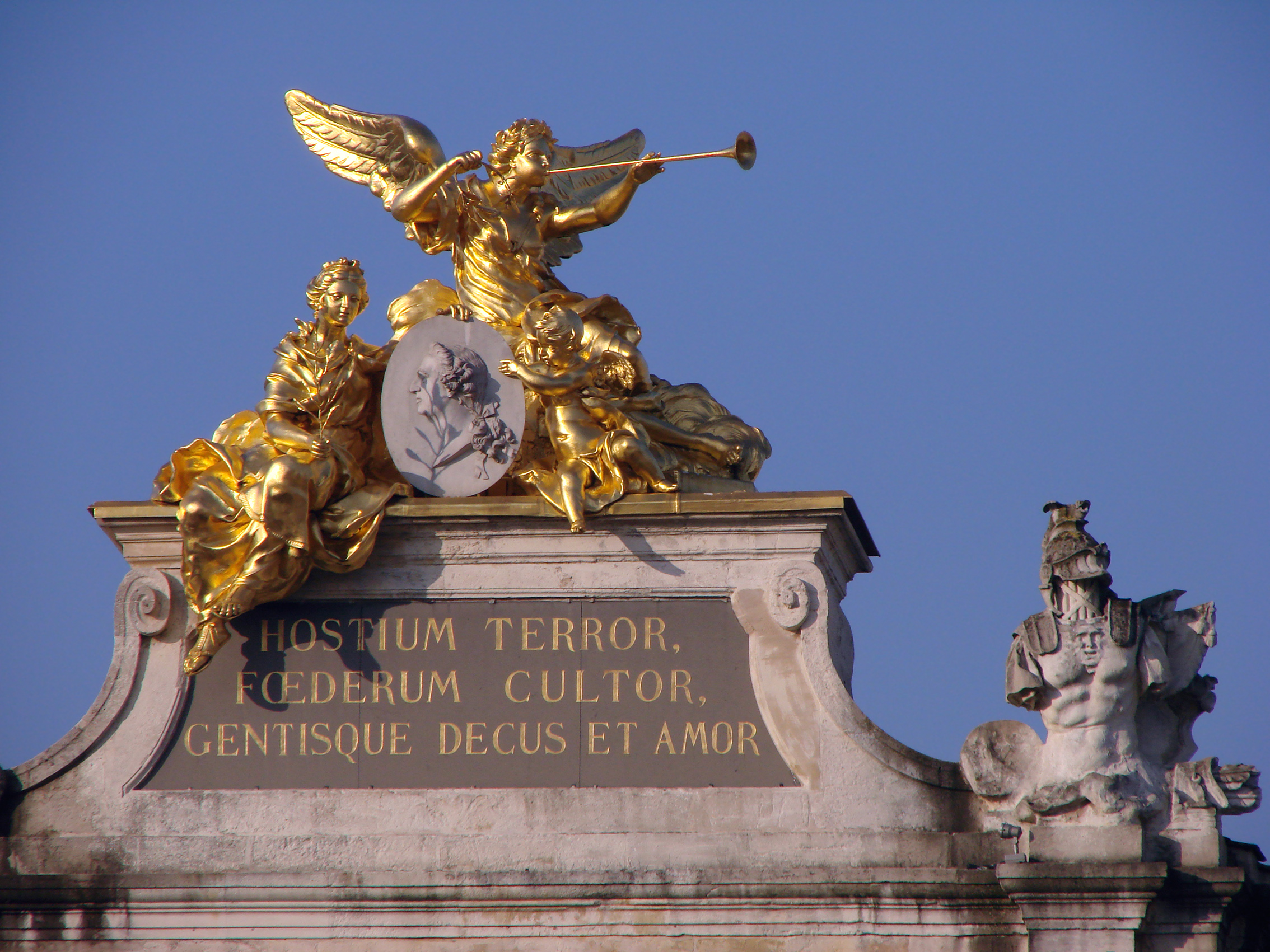 Groupe allégorique au sommet de la Porte Héré, Place Stanislas à Nancy ; inscription : "HOSTIUM TERROR, FOEDERUM CULTOR, GENTISQUE DECUS ET AMOR" (proposition de traduction : "terreur des ennemis, il honore les alliances, honneur et amour de son peuple").